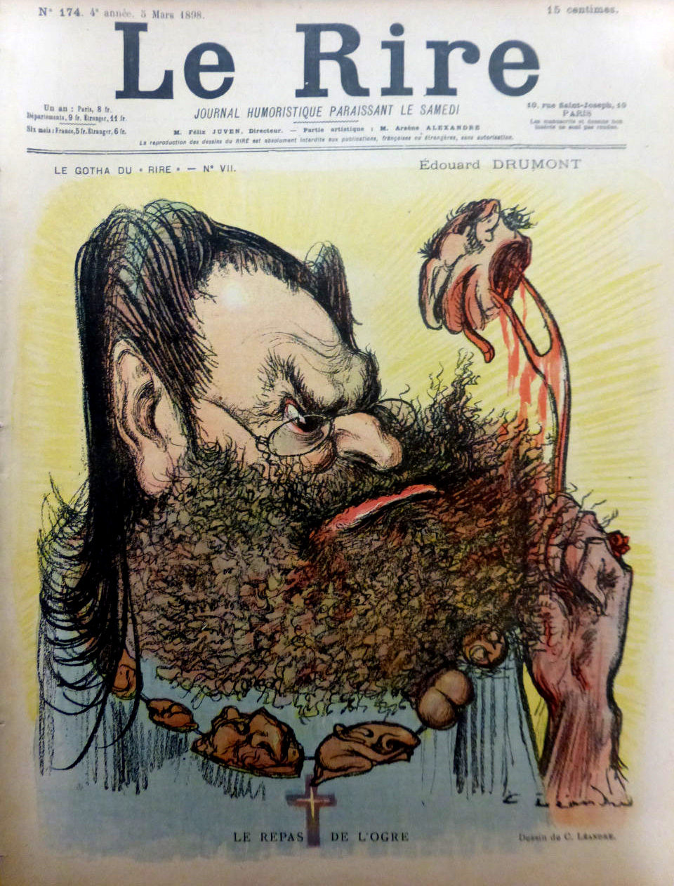 "Le repas de l'ogre" - caricature du journaliste antisémite Édouard Drumont, par Charles Léandre, en couverture du journal Le Rire, n° 174, 5 mars 1898.